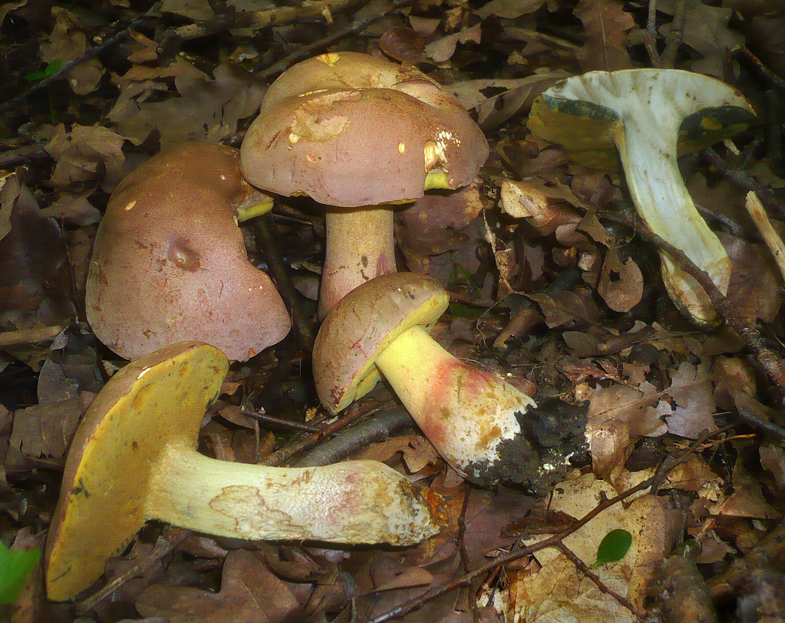 Boletus fechtneri Velenovsky